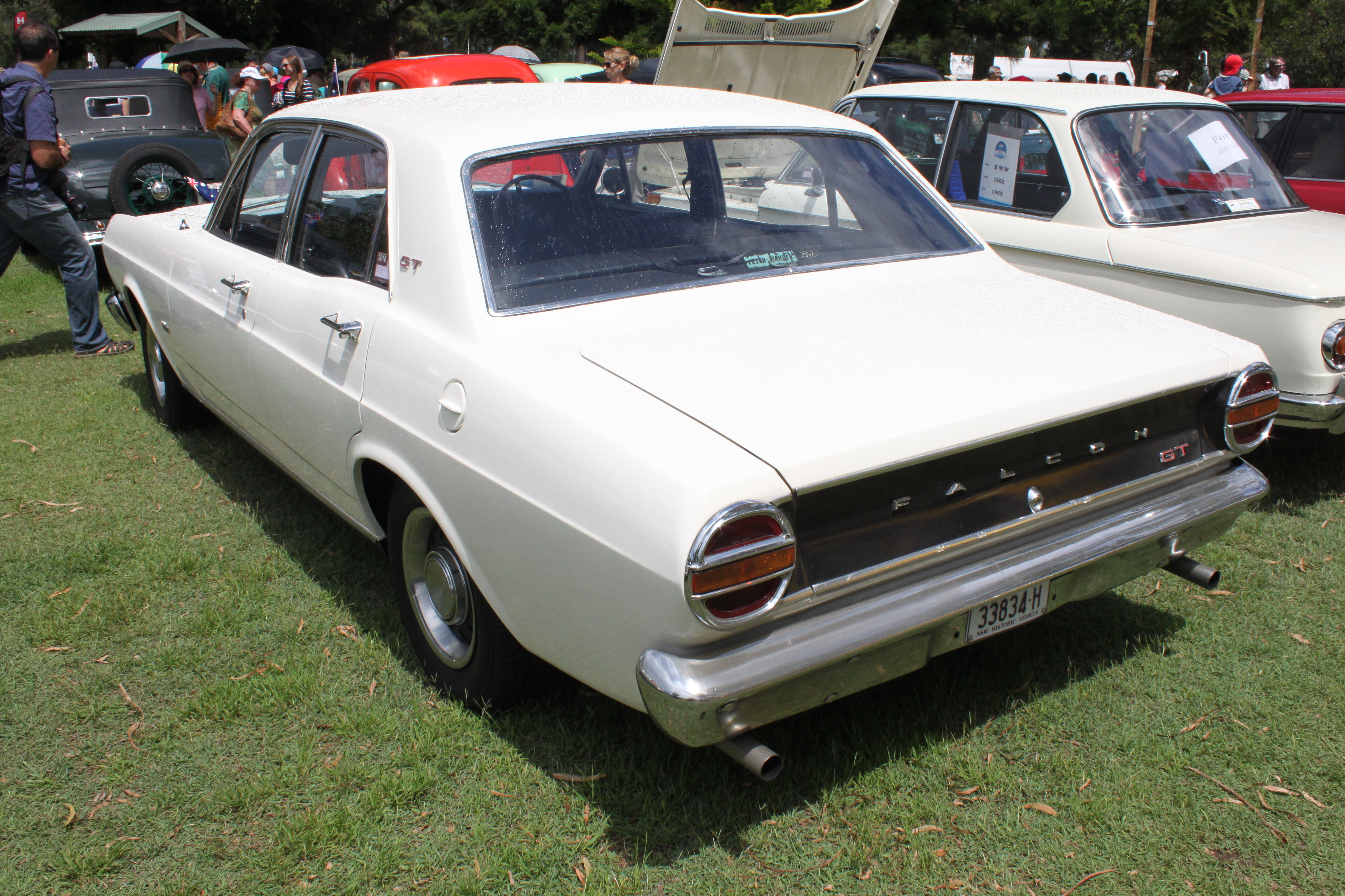 CARnivale, Parramatta Park, NSW Australia Day 2016